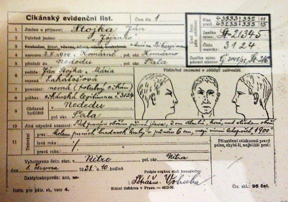 Cigánsky evidenčný list z roku 1938.